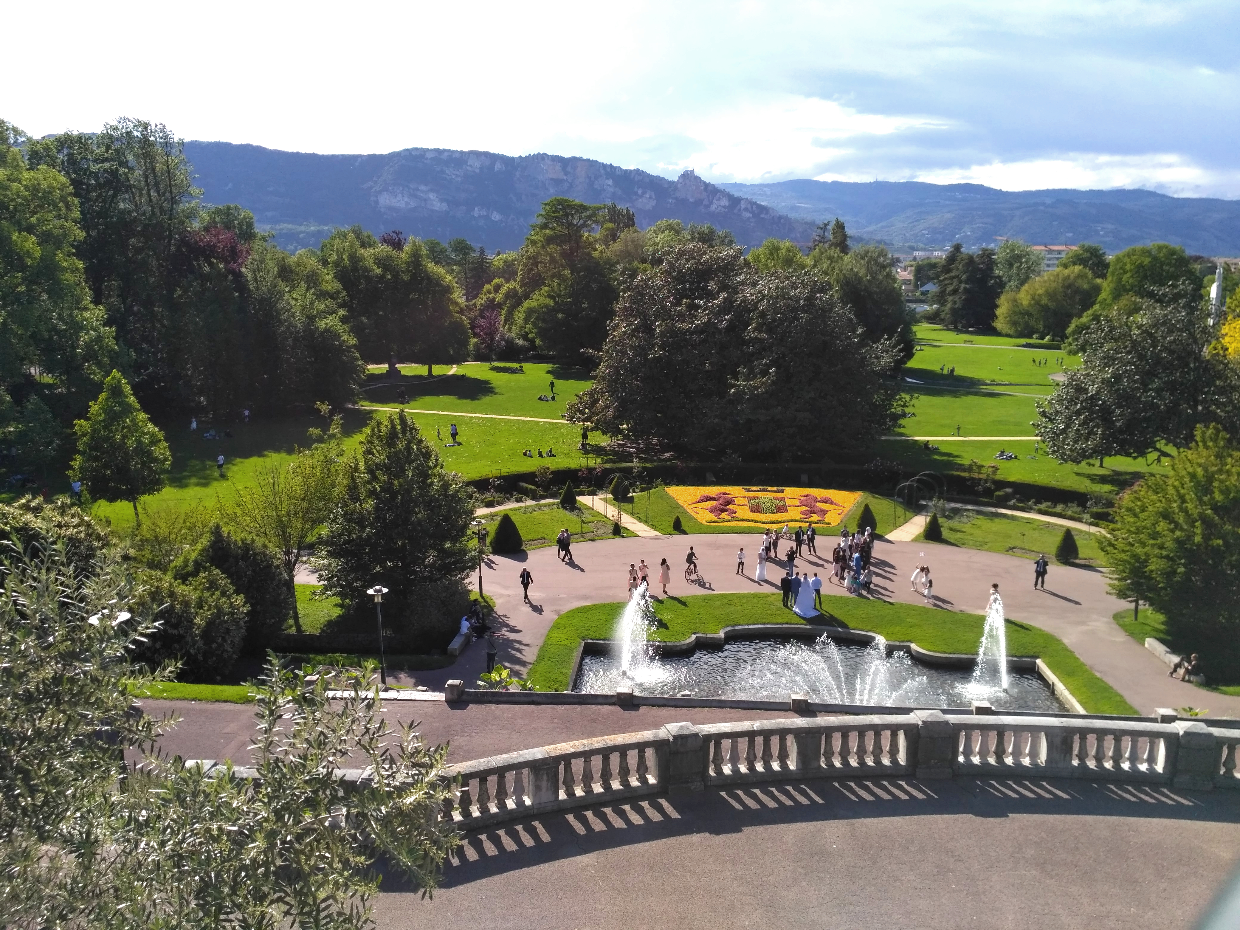 Vue du parc Jouvet à Valence au printemps 2017.